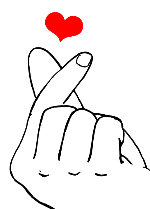 手指心形，比心，心形手勢